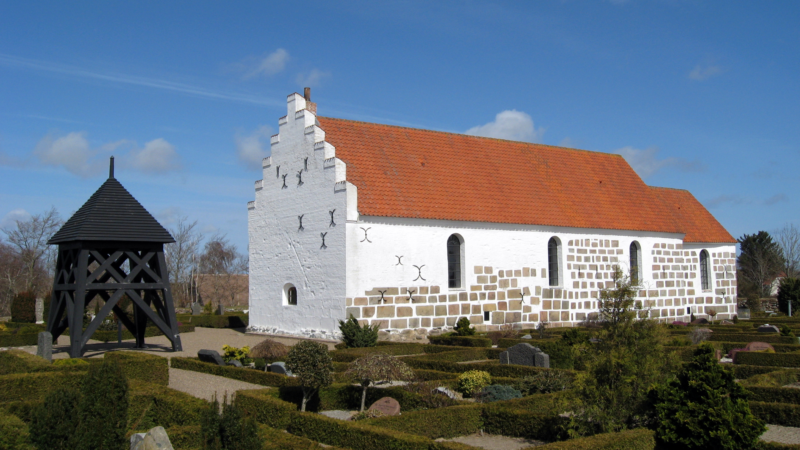 Hørmested Kirke, Hjørring Kommune